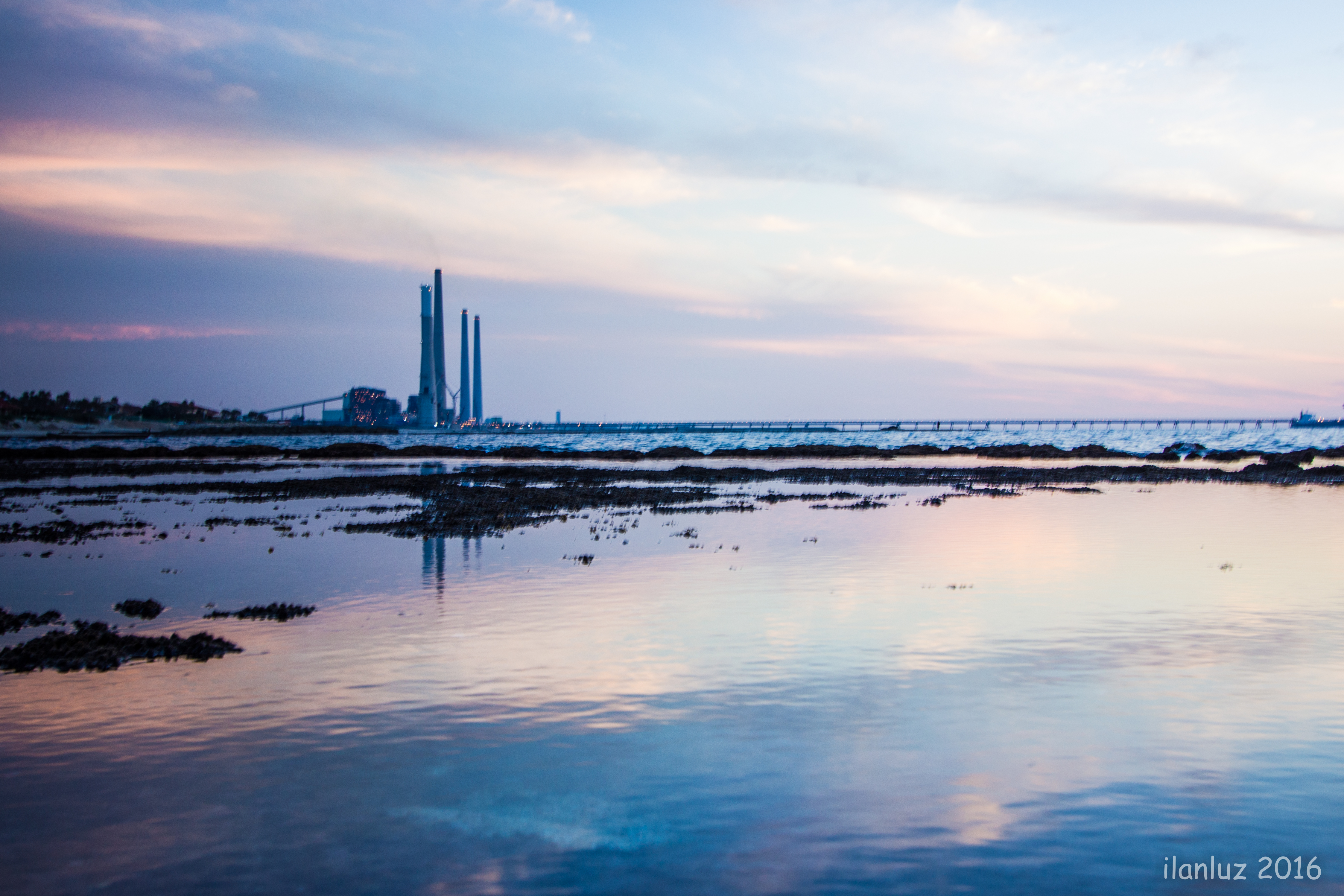 ארובות תחנת הכוח בחדרה נקודת המבט מחוף קיסריה